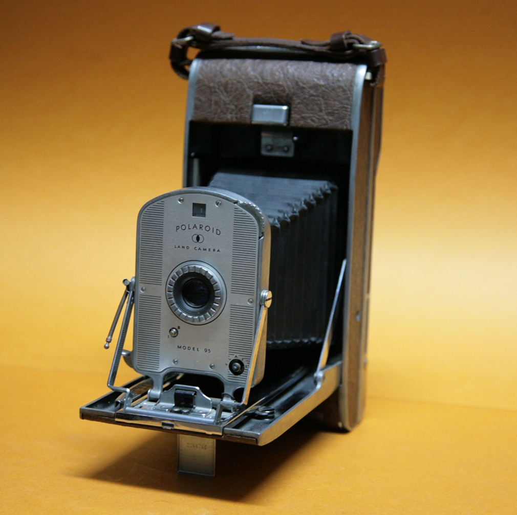 Coll. Marcè CL - Polaroid land camera Mod 95 1948; prima fotocamera di successo al mondo a sviluppo rapido: sviluppo che avveniva in 1 minuto con 8 pose di scatto.